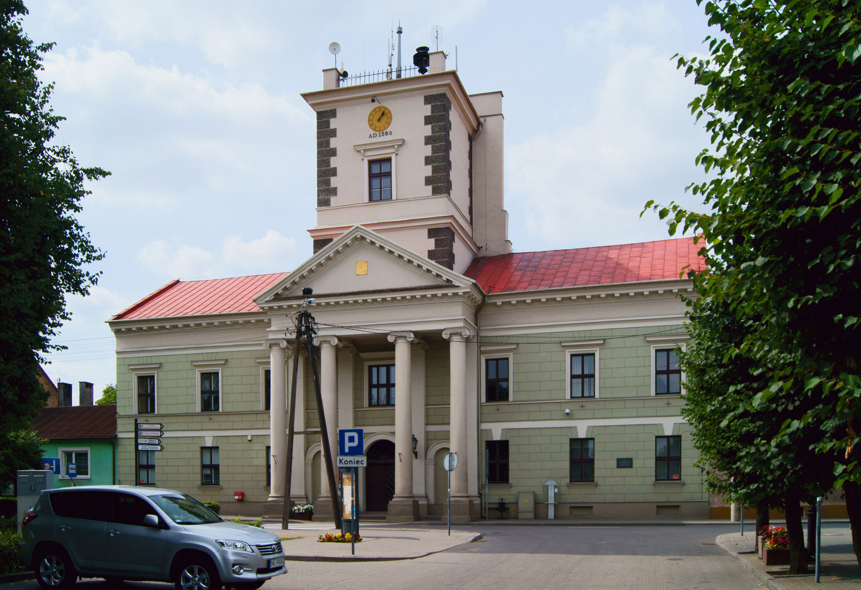 Brześć Kujawski - ratusz, 1824